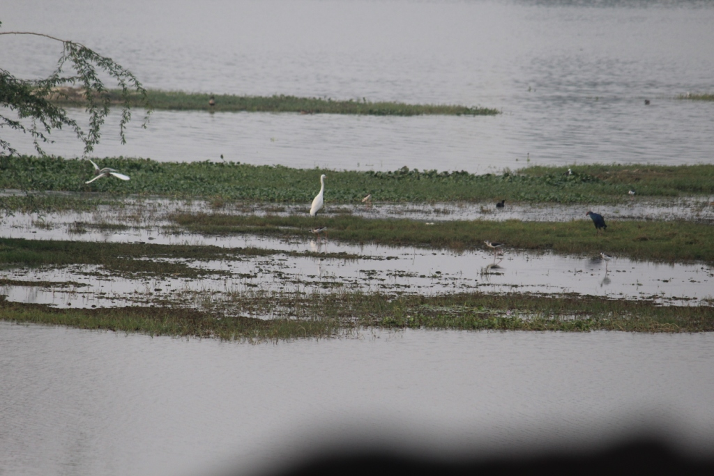 கொரட்டூர் எரி